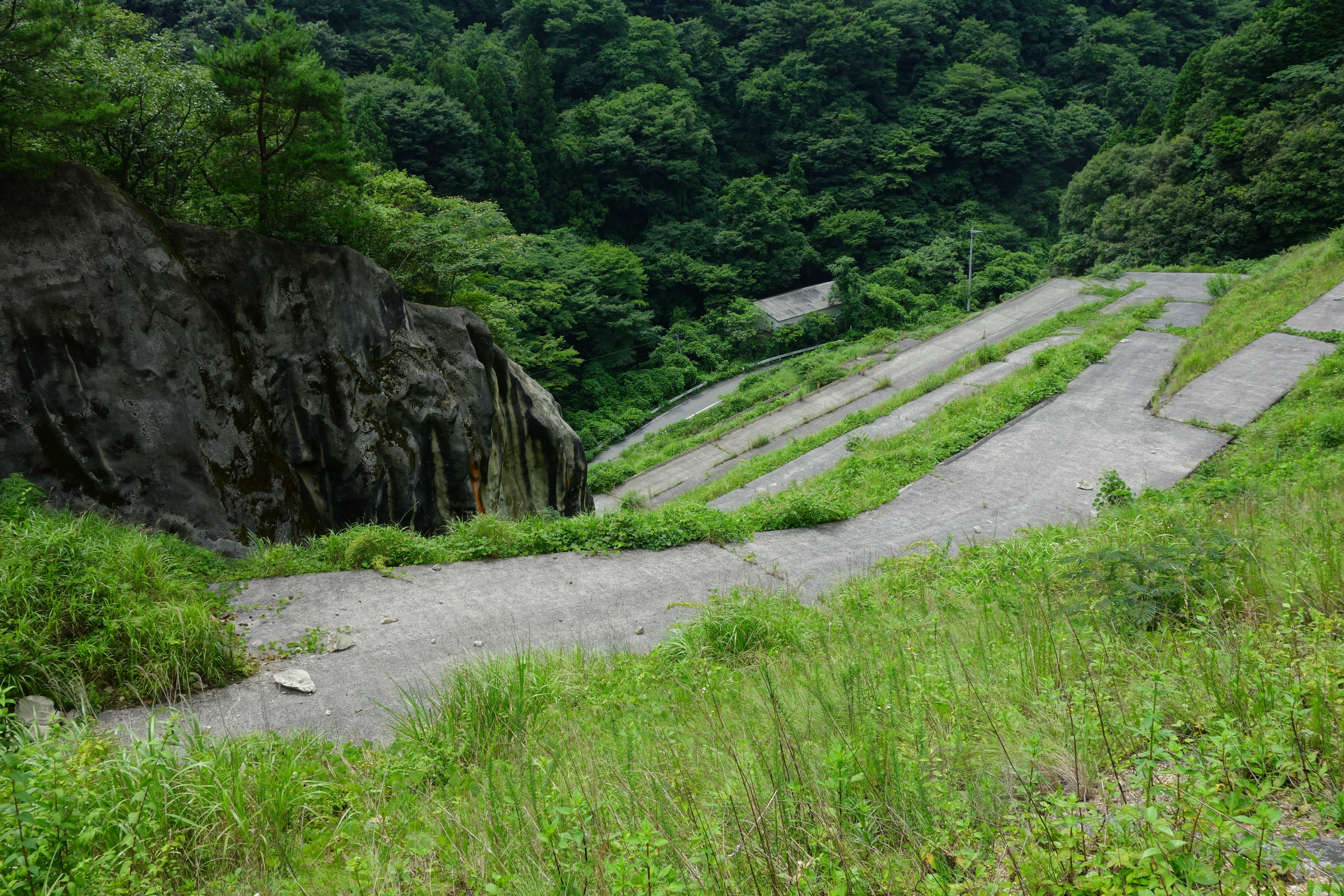 広島県府中市の出口川湧水処理施設の上流にある鉱毒が溶出している採石場。中腹より西側を見下ろす。一番下の道路が県道388号線。